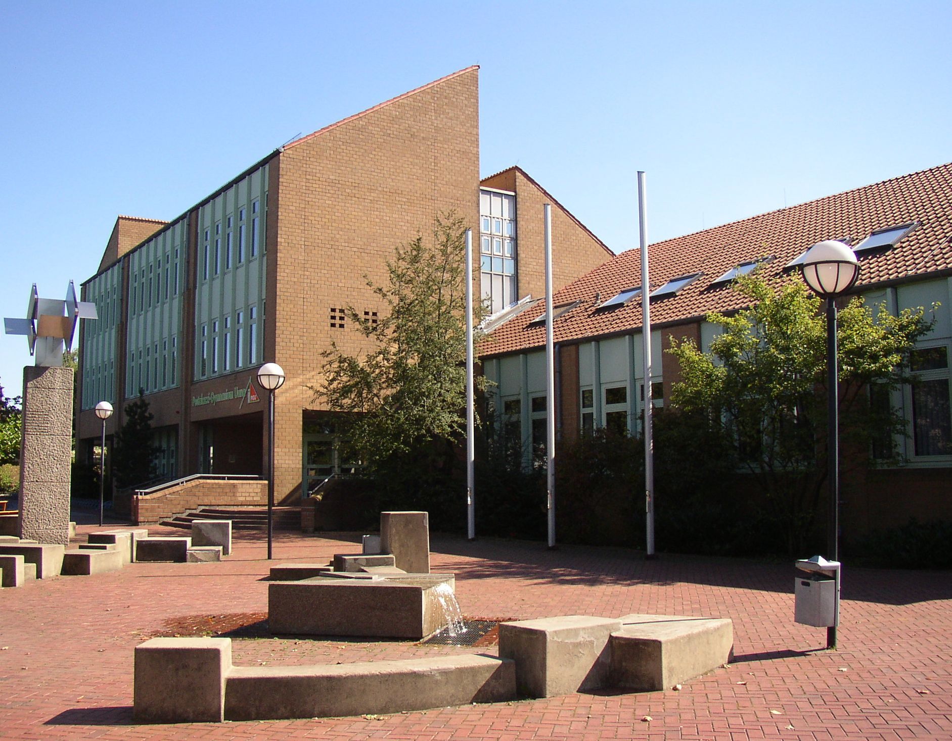 Vorderseite des Pestalozzi-Gymnasiums in Unna (gesehen von der Morgenstraße)